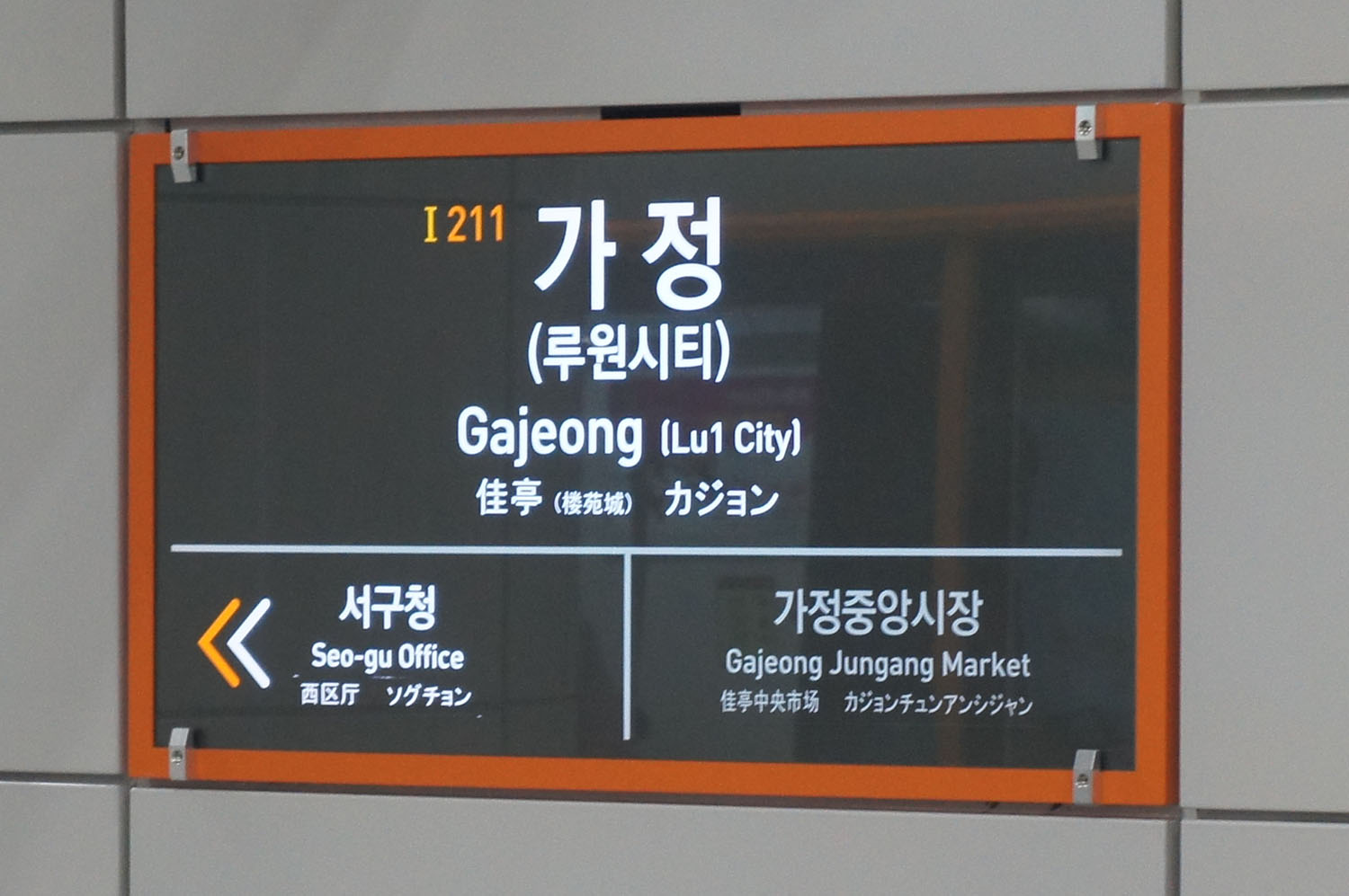 가정역 역명판